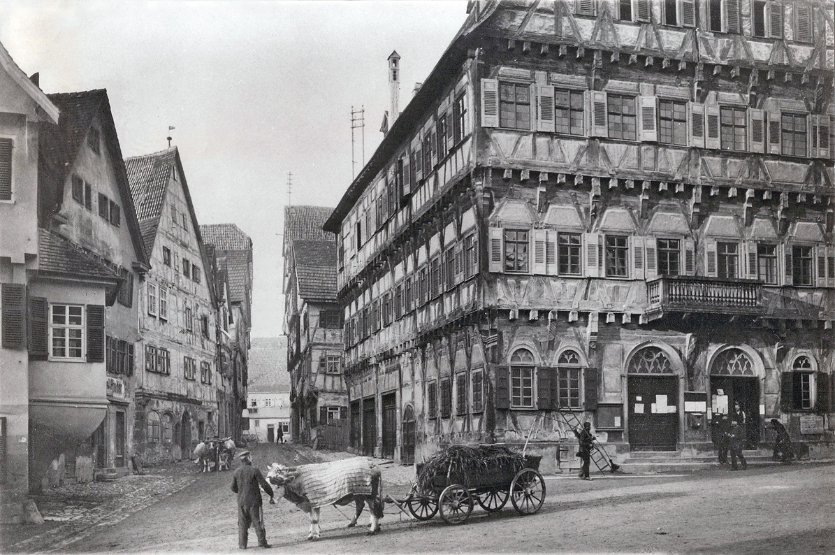 Markgröninger Marktplatz-Szenerie 1916: Ochsengespanne, Kaminfeger auf Bodenwaage vor dem Rathaus (noch mit Balkon und Doppelportal, jedoch bereits mit Strommasten), Blick in die Finstere Gasse mit dem 1917 abgebrannten Haus Nr. 3